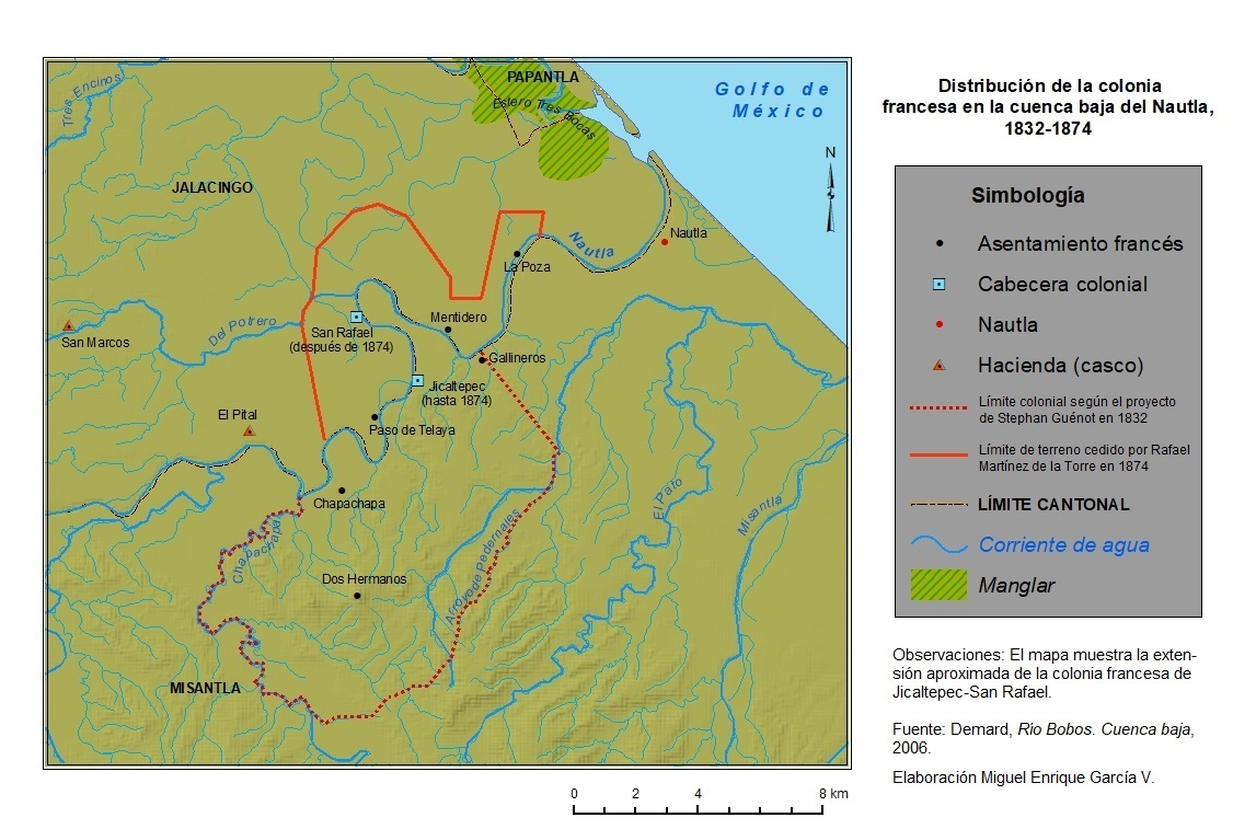 Distribución de la colonia francesa en el centro-norte de Veracruz, durante el siglo XIX.